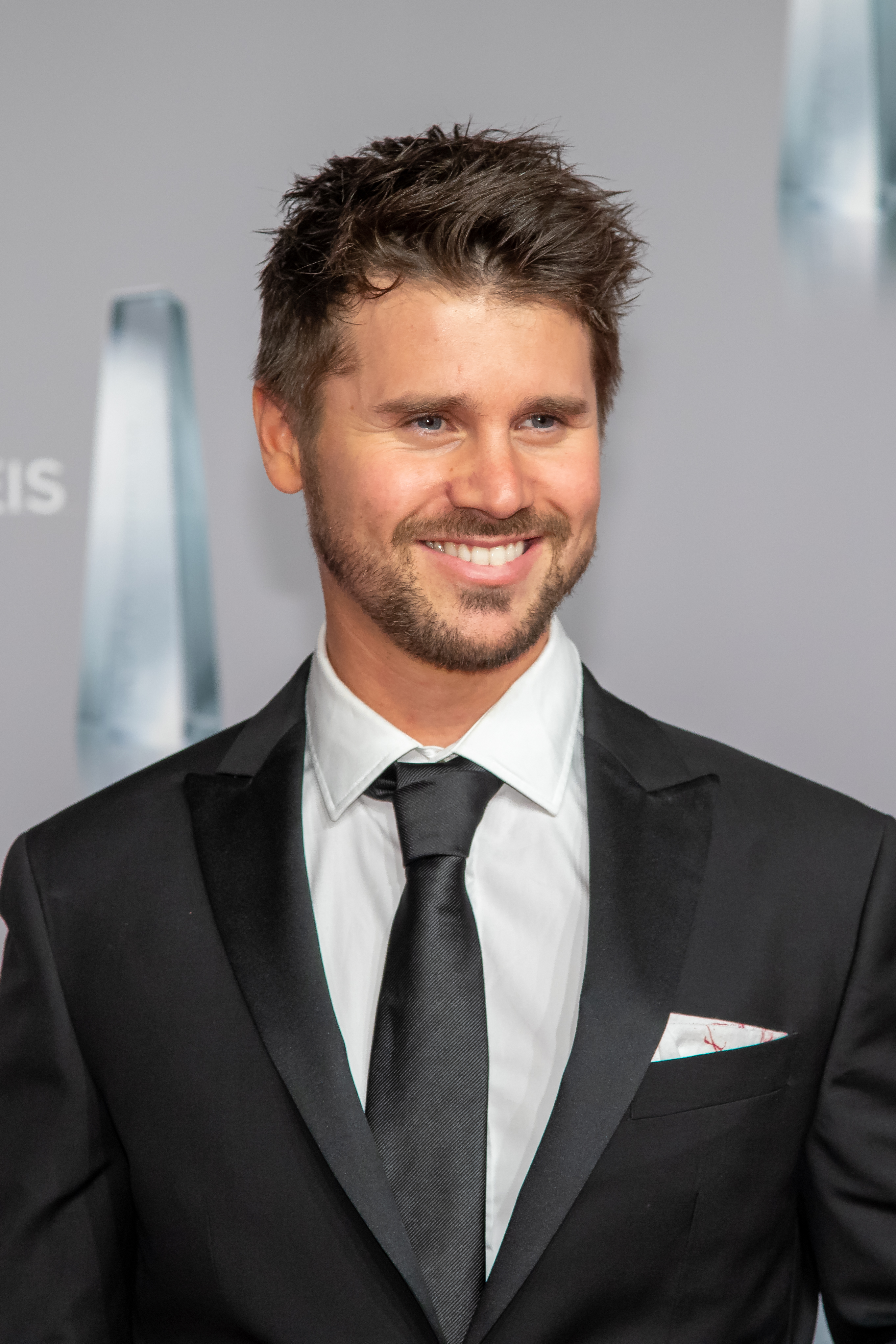 Thore Schölermann beim Deutschen Fernsehpreis 2019 in der Düsseldorfer Rheinterrasse